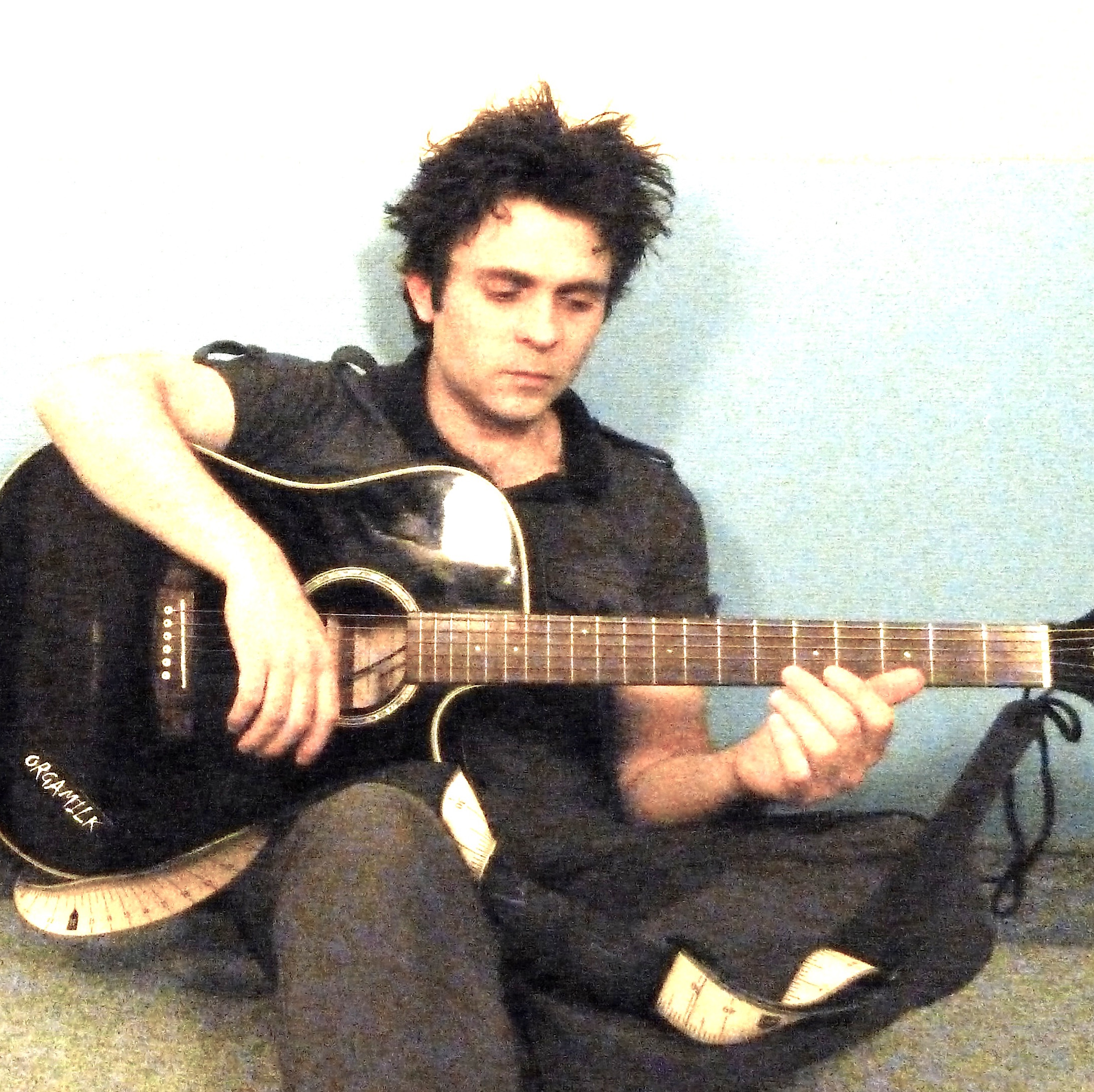 Pierre Rousseau (AKA Pedro Rousseau) (chanteur et compositeur de Fresh Body Shop)